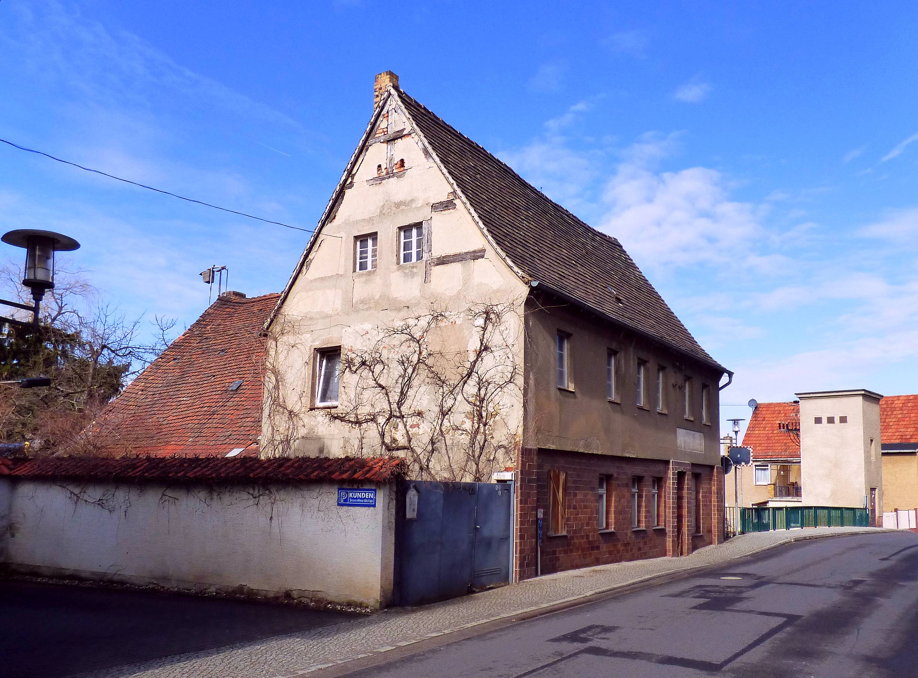 Ehemalige Färberei Hauptvogel in Ortrand an der Straße der Einheit 23 - Baudenkmal